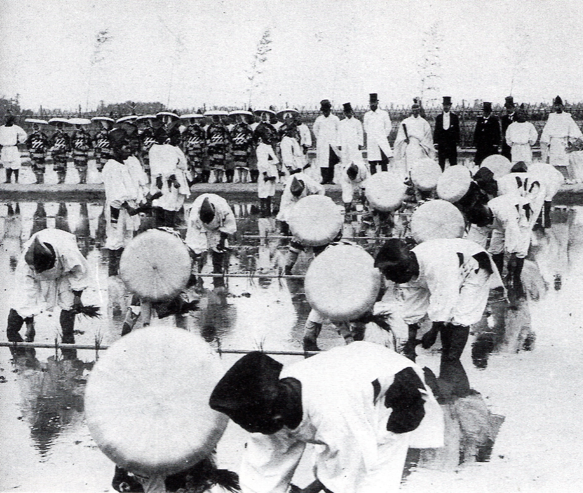 六ツ美悠紀斎田お田植えまつり。愛知県碧海郡六ツ美村大字下中島（現・岡崎市中島町）。